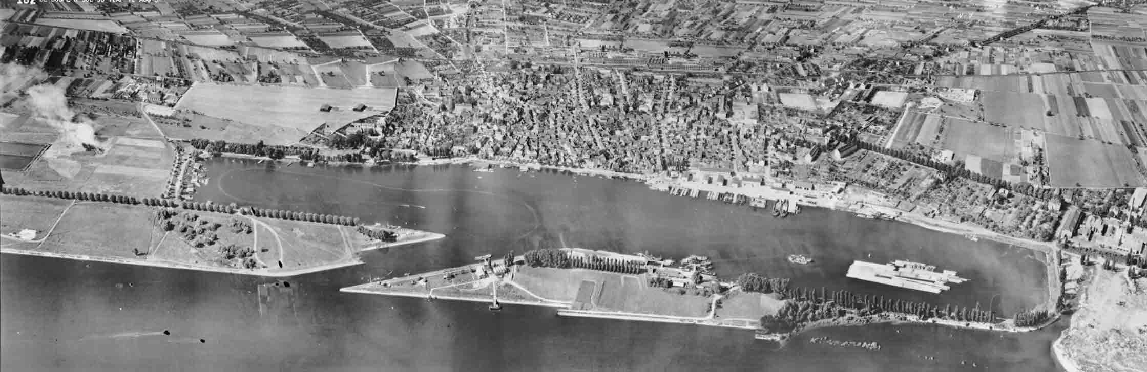 Rheinbefliegung, Wiesbaden-Schierstein Rheinbefliegung der Alliierten 1953